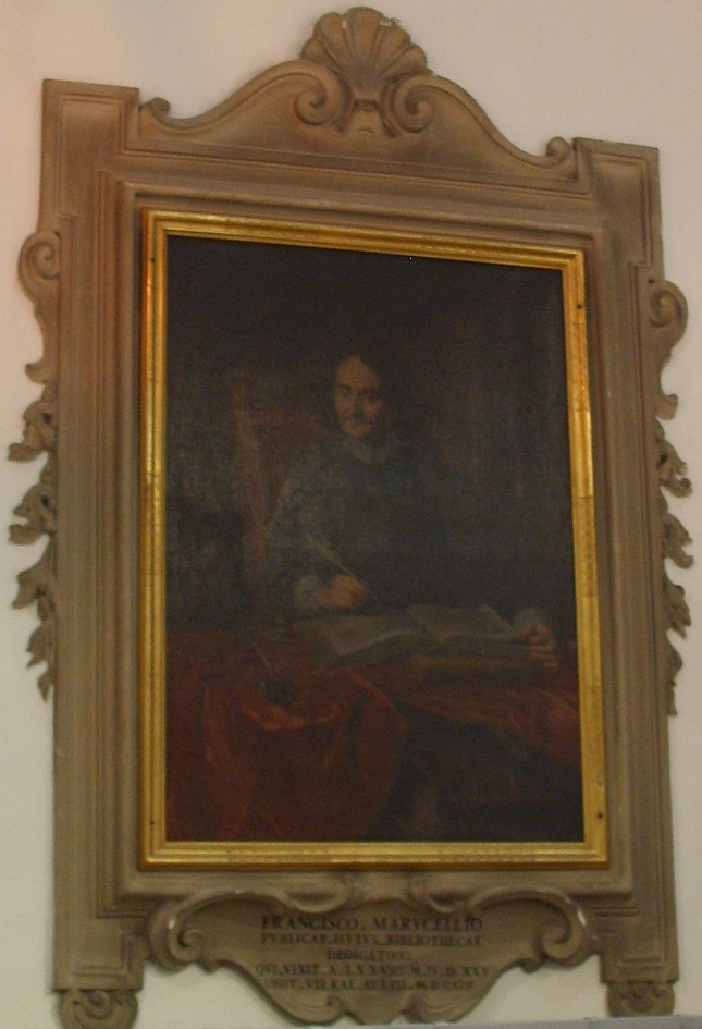 Biblioteca marucelliana, ritratto di francesco marucelli